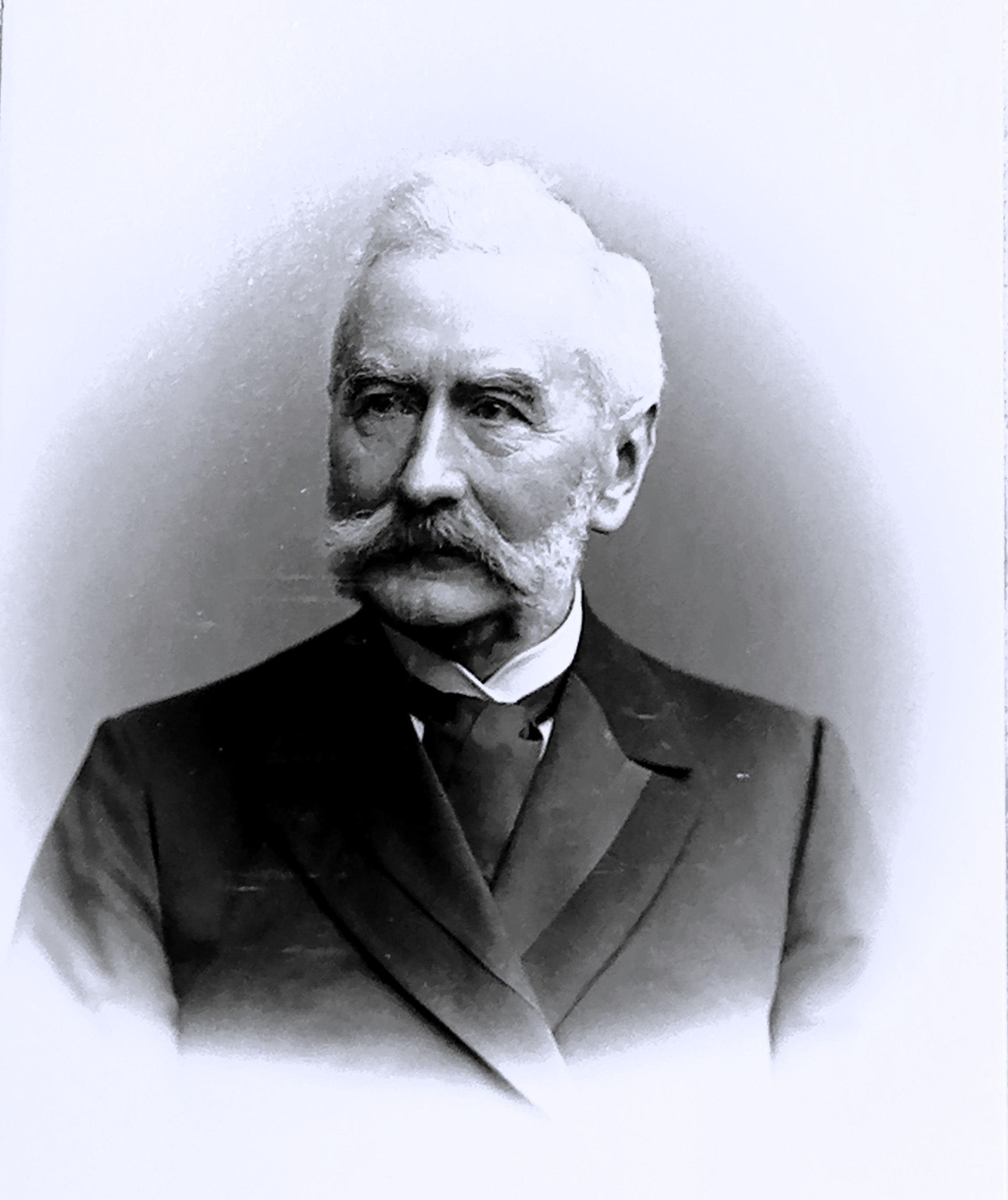 Würdigung des Senators Dr. Heinrich Alphons Plessing zur 25-jährigen Mitgliedschaft im Lübecker Senat